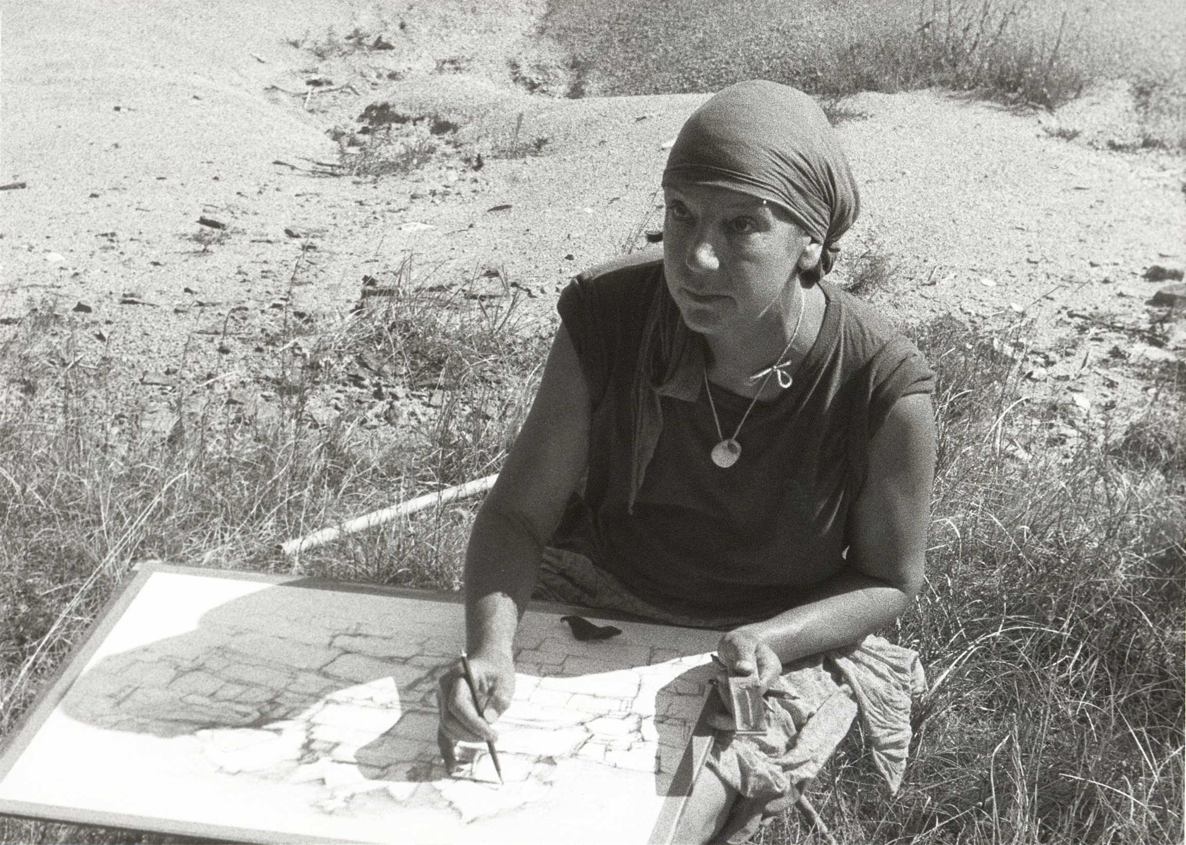 Christine Heuer 1983, Istrien